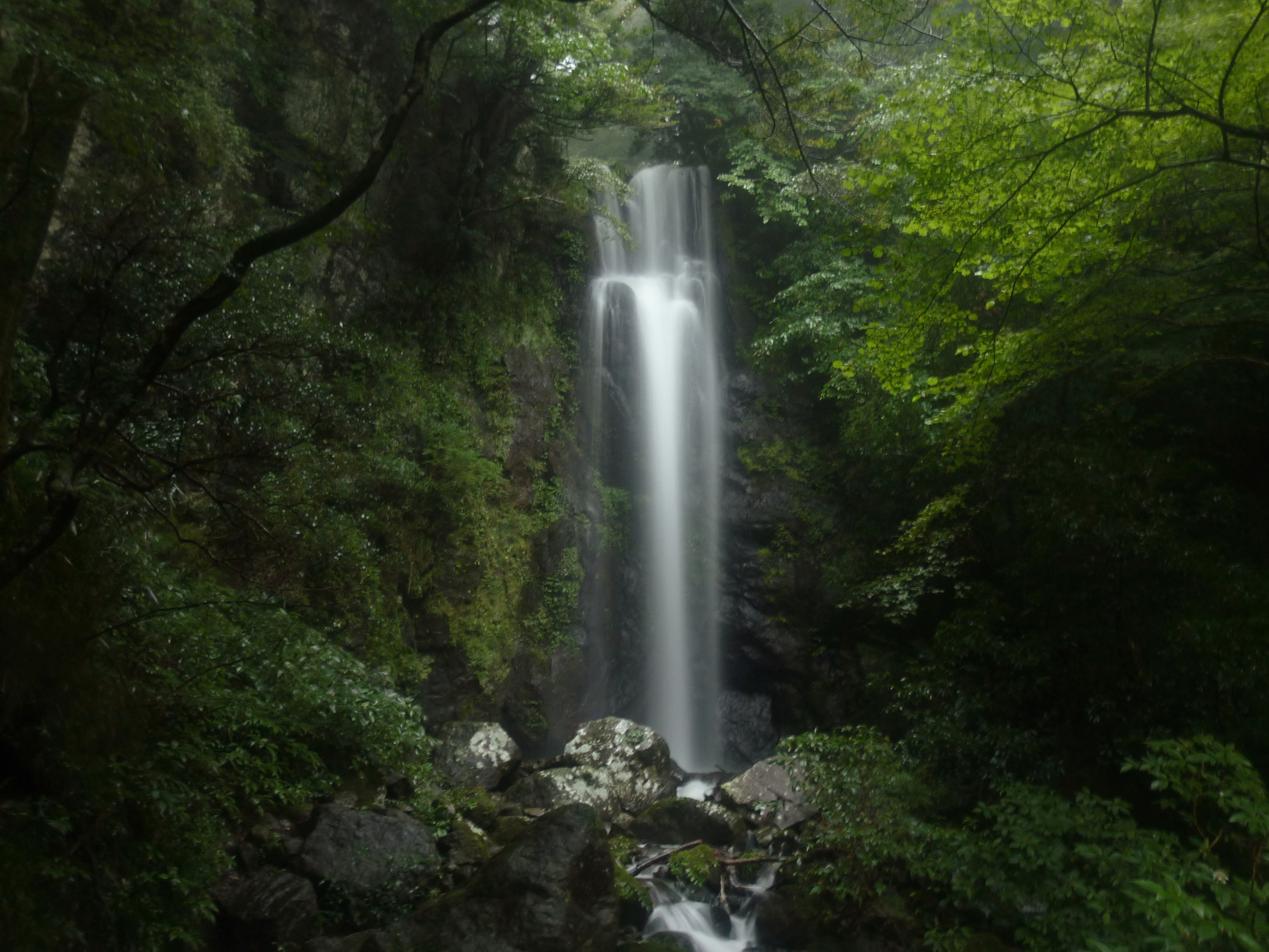 白雲の滝（神奈川県湯河原町）